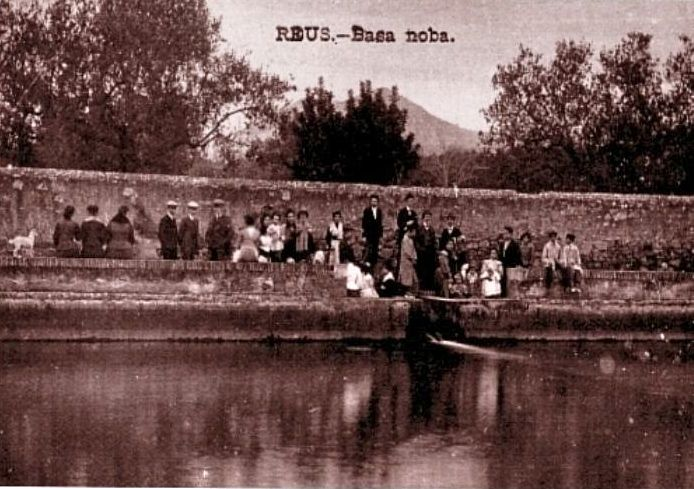 La Bassa Nova un dia festiu de l'any 1900